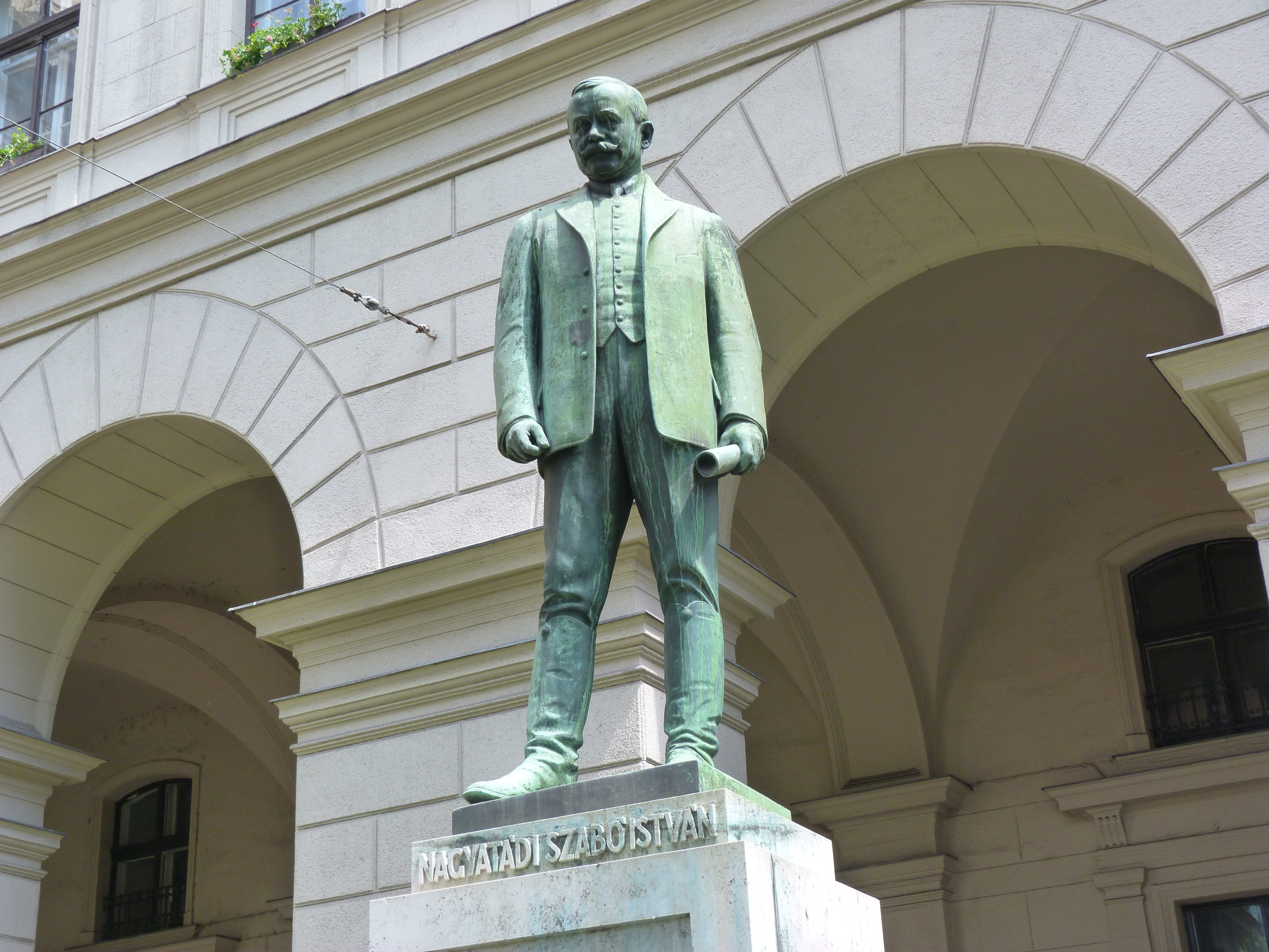 A felvétel 2012. május 19 -én készült Budapesten, a Kossuth téren. Nagyatádi Szabó István szobra.